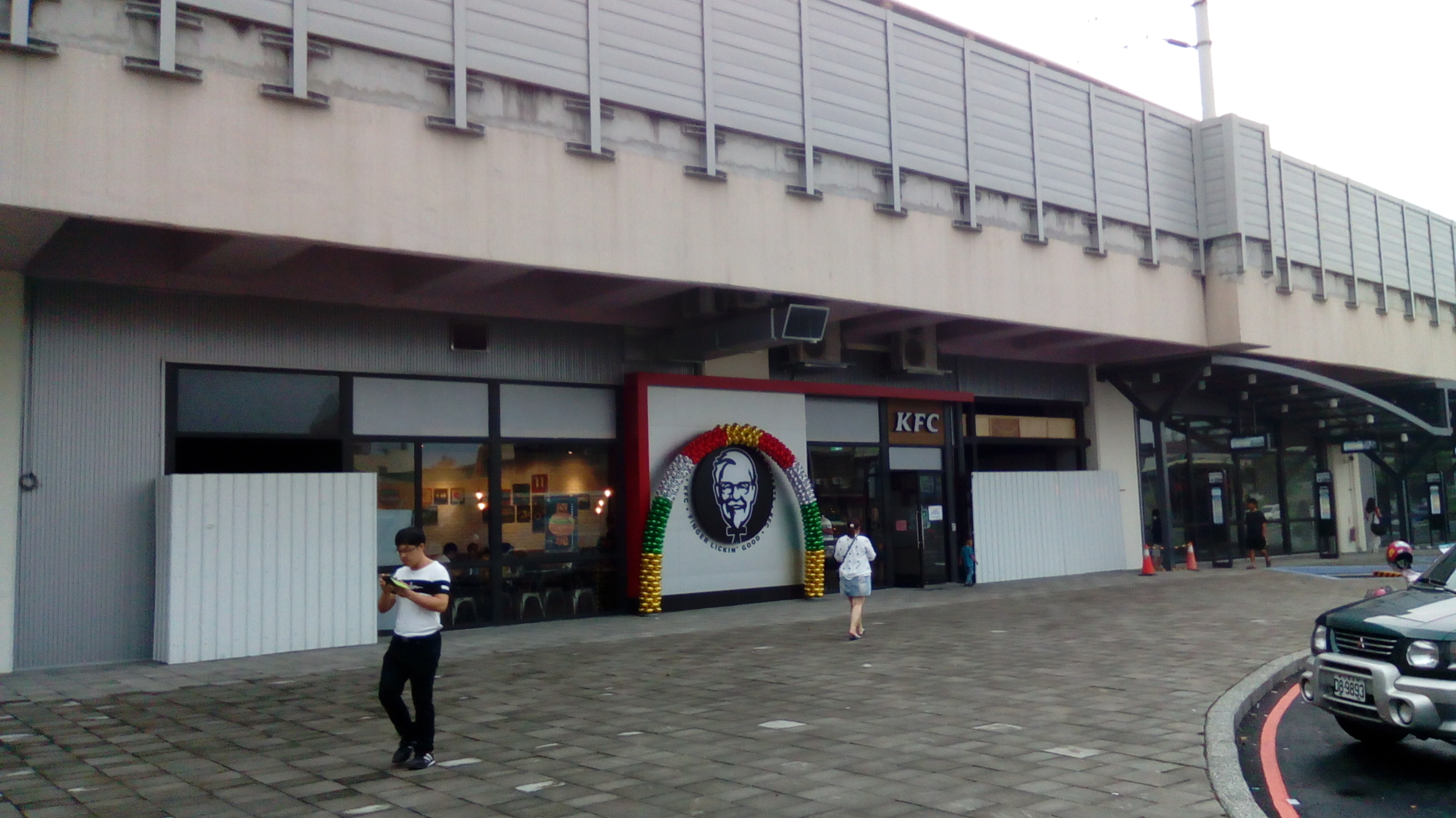 潮州高架化站體的一部分